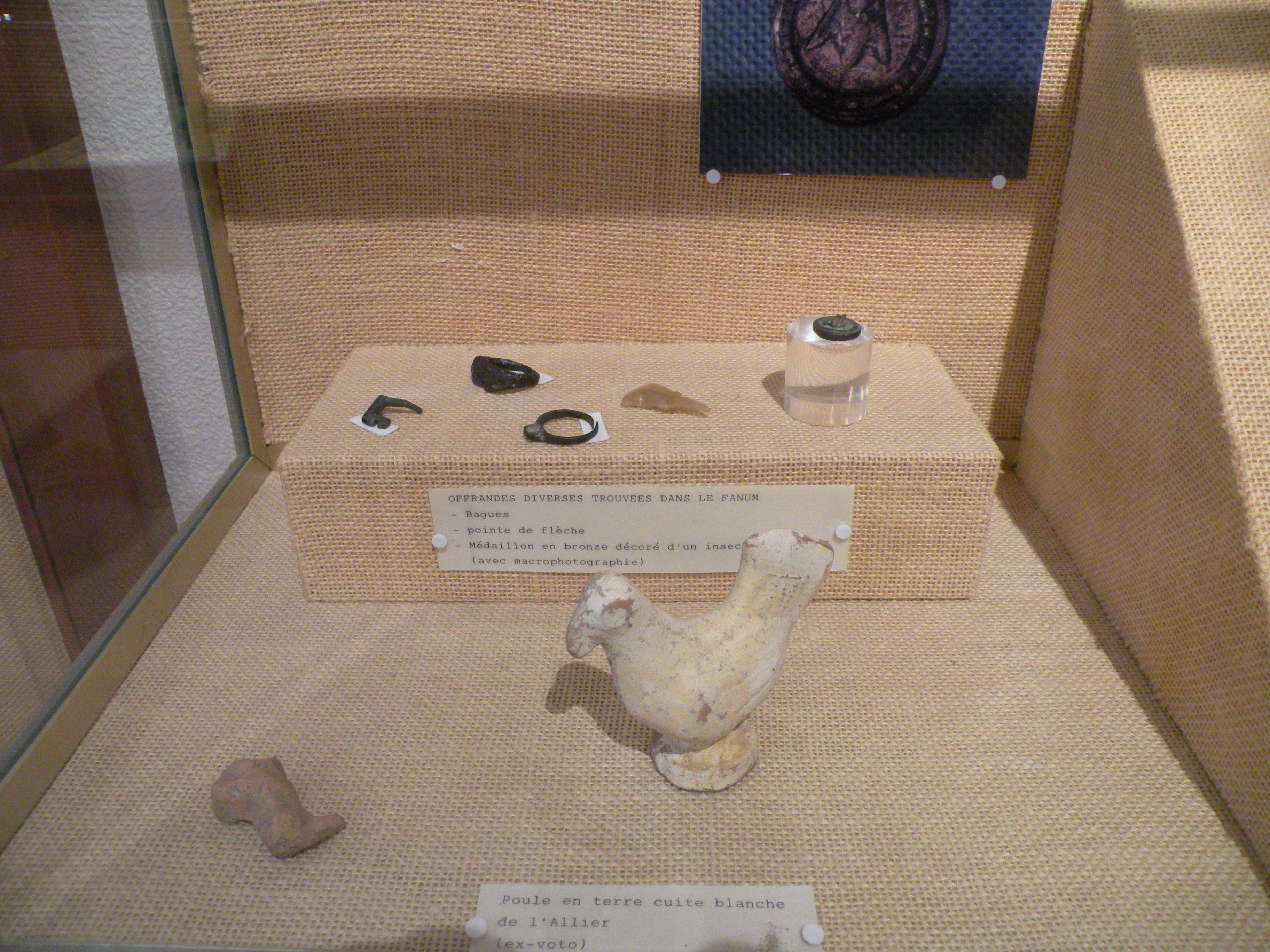 Musée de Thésée (Loir-et-Cher)